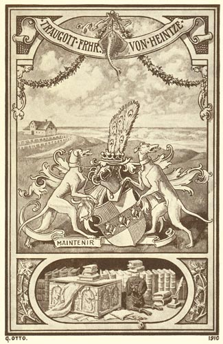 Georg Otto: Wappen-Exlibris für Traugott von Heintze